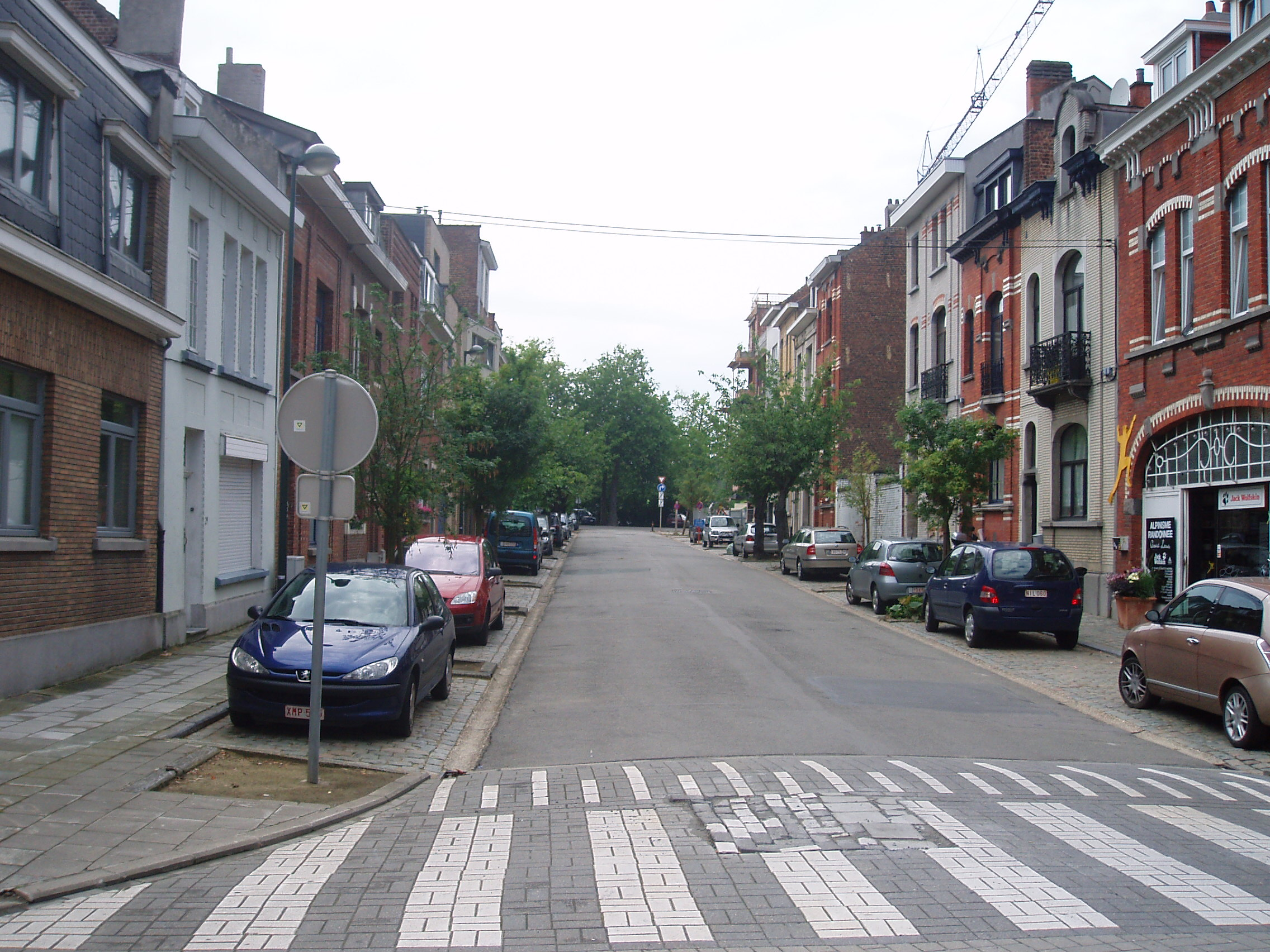 avenue Pierre Devis Auderghem Belgium